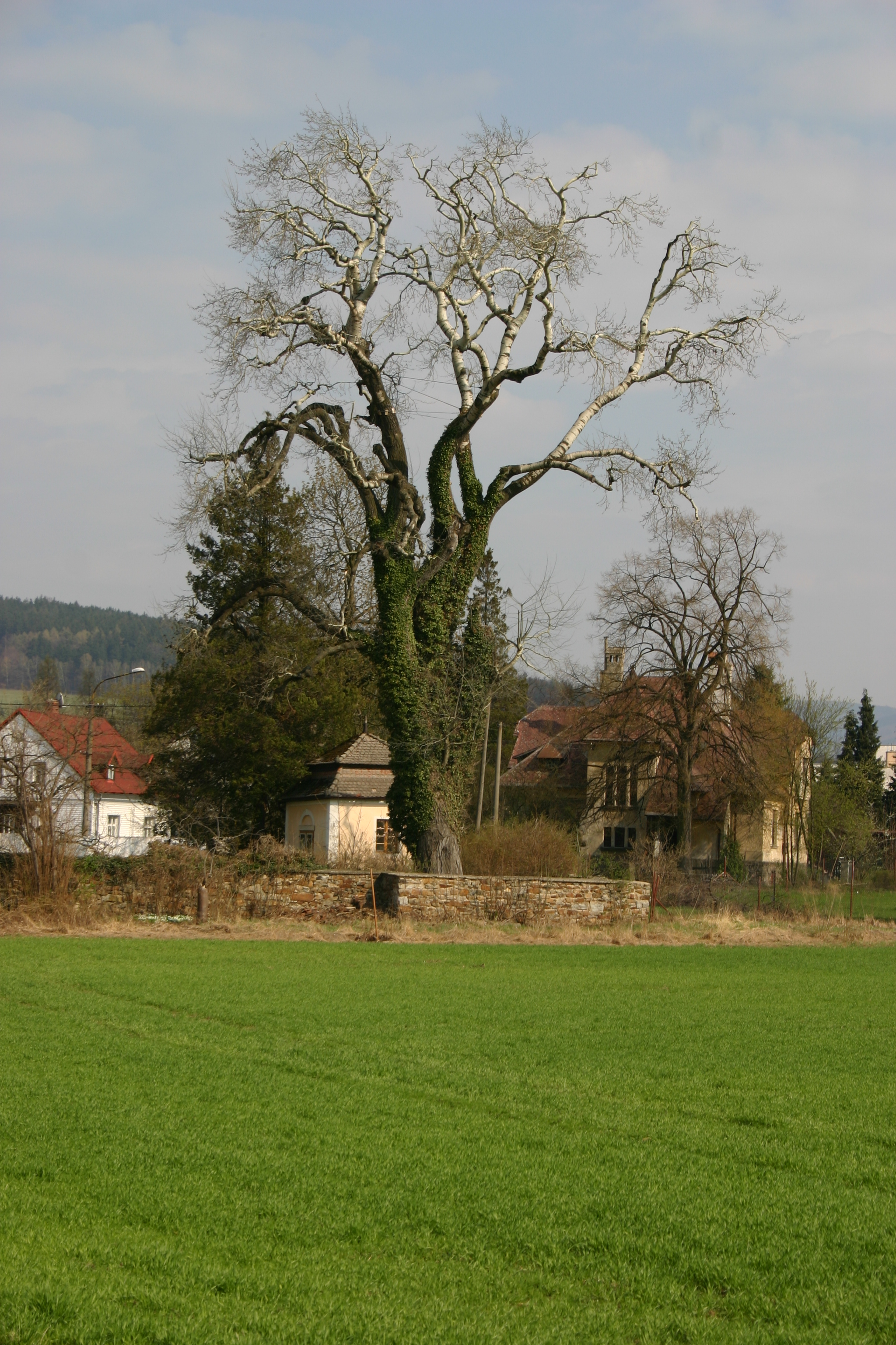 Linda v Raspenavě - Raspenava